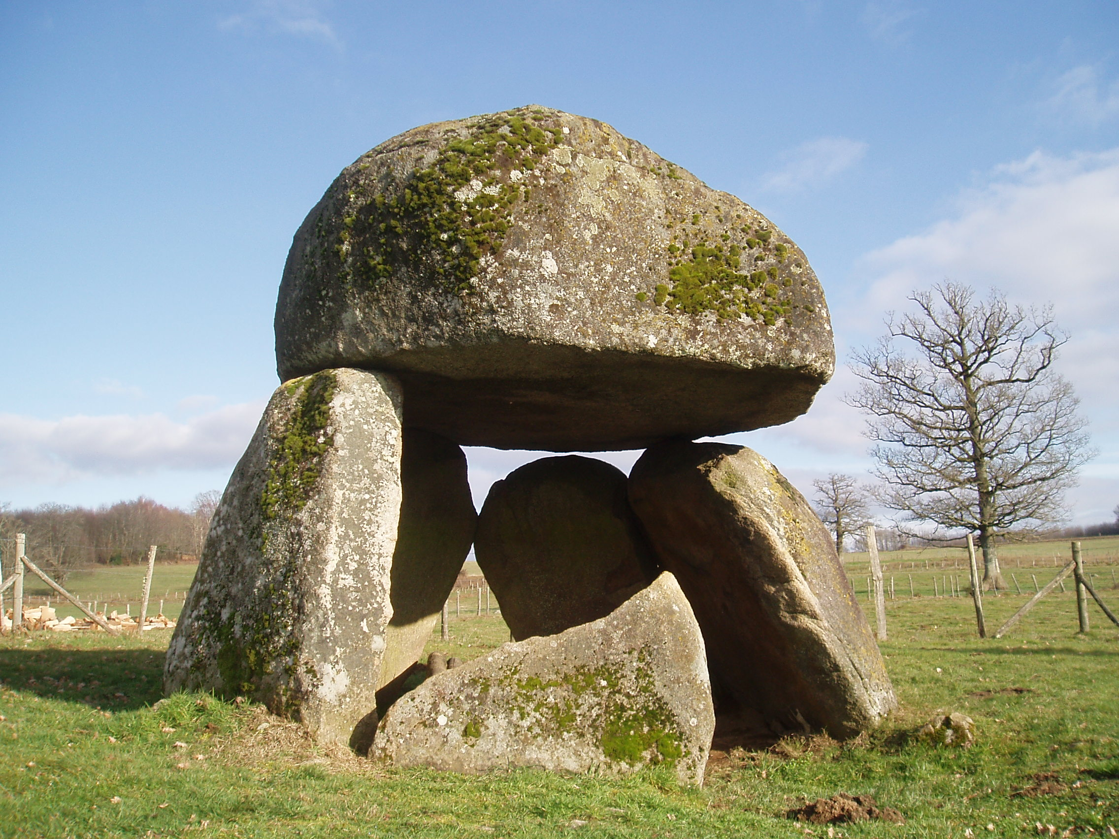 Dolmen